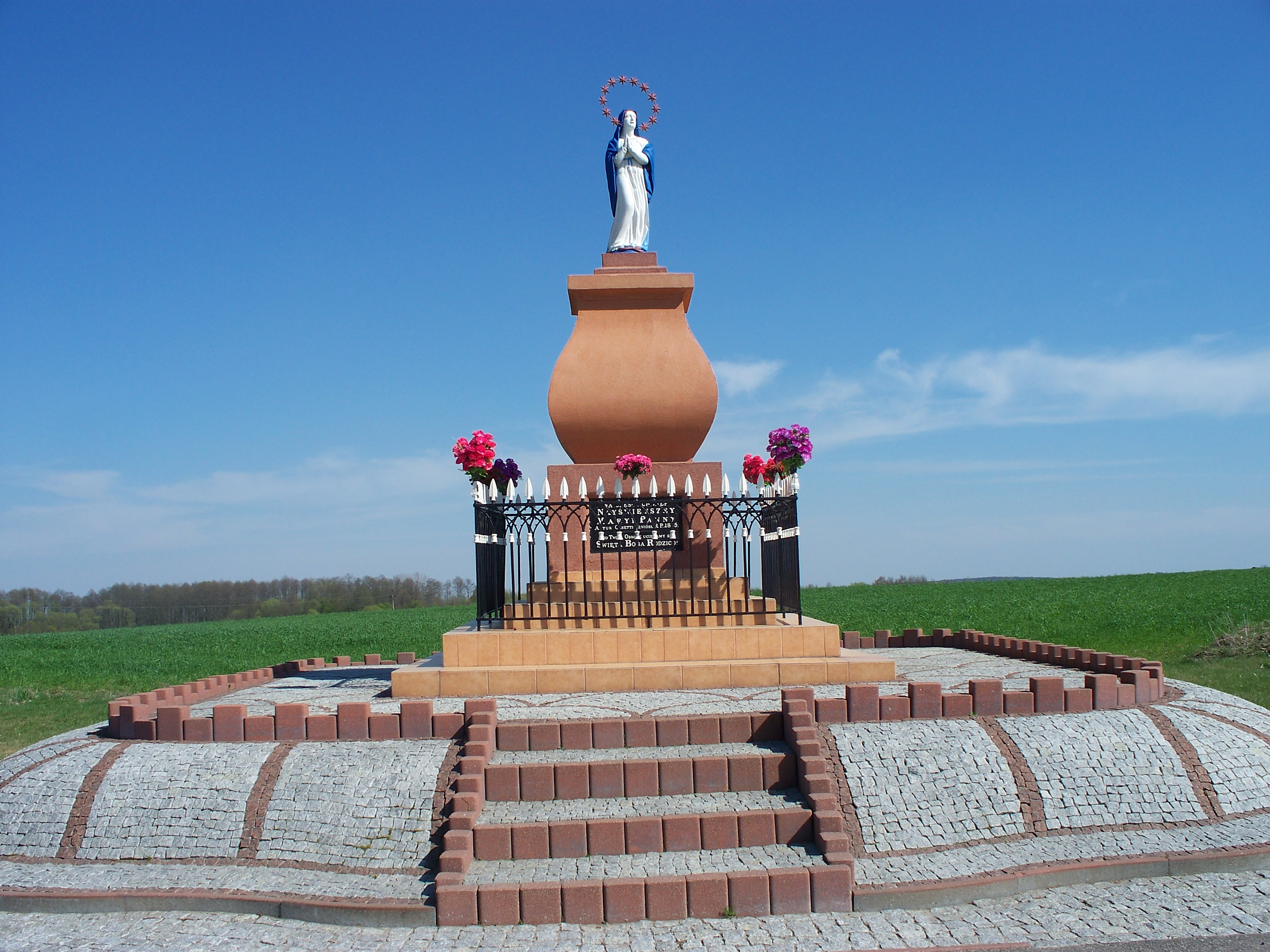 Figura ta znajduje się na krzyżówce jadąc z Waniewa w kierunku Kowalewszczyzny. Na kostkowym marmurkowym cokole znajdują się trzy tablice na jednej z nich napis: „Na Cześć i Chwałę Nayświętszey Maryi Panny Artur Orsetti wzniósł R P. 1855. Pod Twoją Obronę uciekamy się Święta Boga Rodzico!”. Jest to czworoboczny baniasto wybrzuszony postument, ogrodzenie żeliwne neogotyckie.